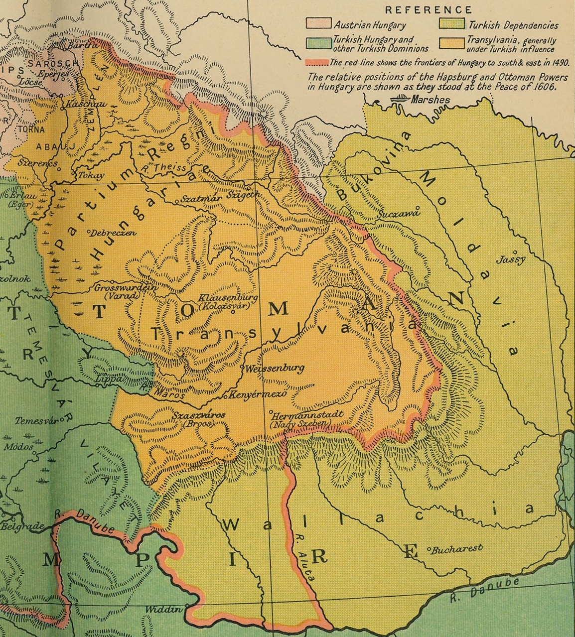 Mapa Transilvánie 1606